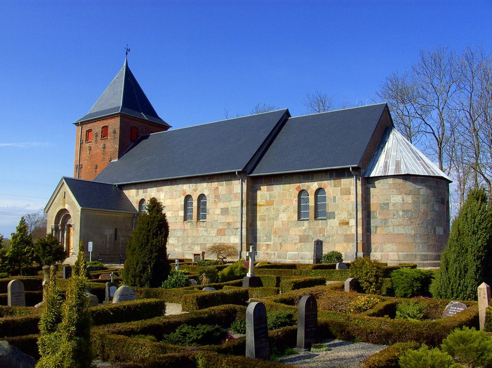 fra sydøst